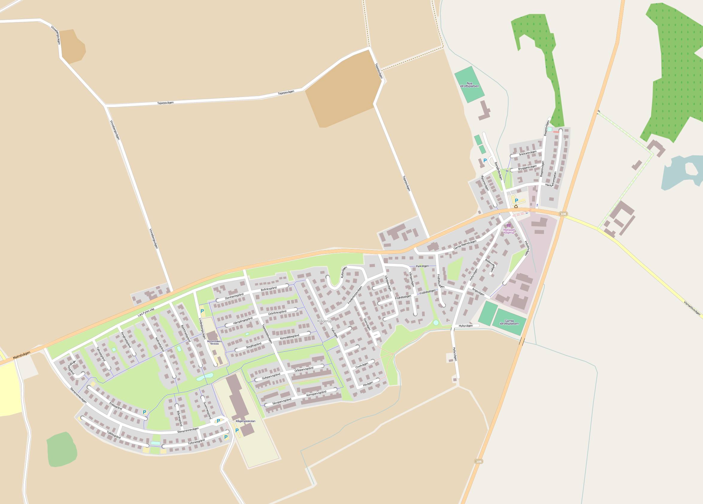 Map of Klågerup, Sweden